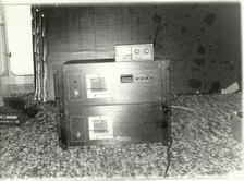 Emetteur FM 100 Watts made in Italia